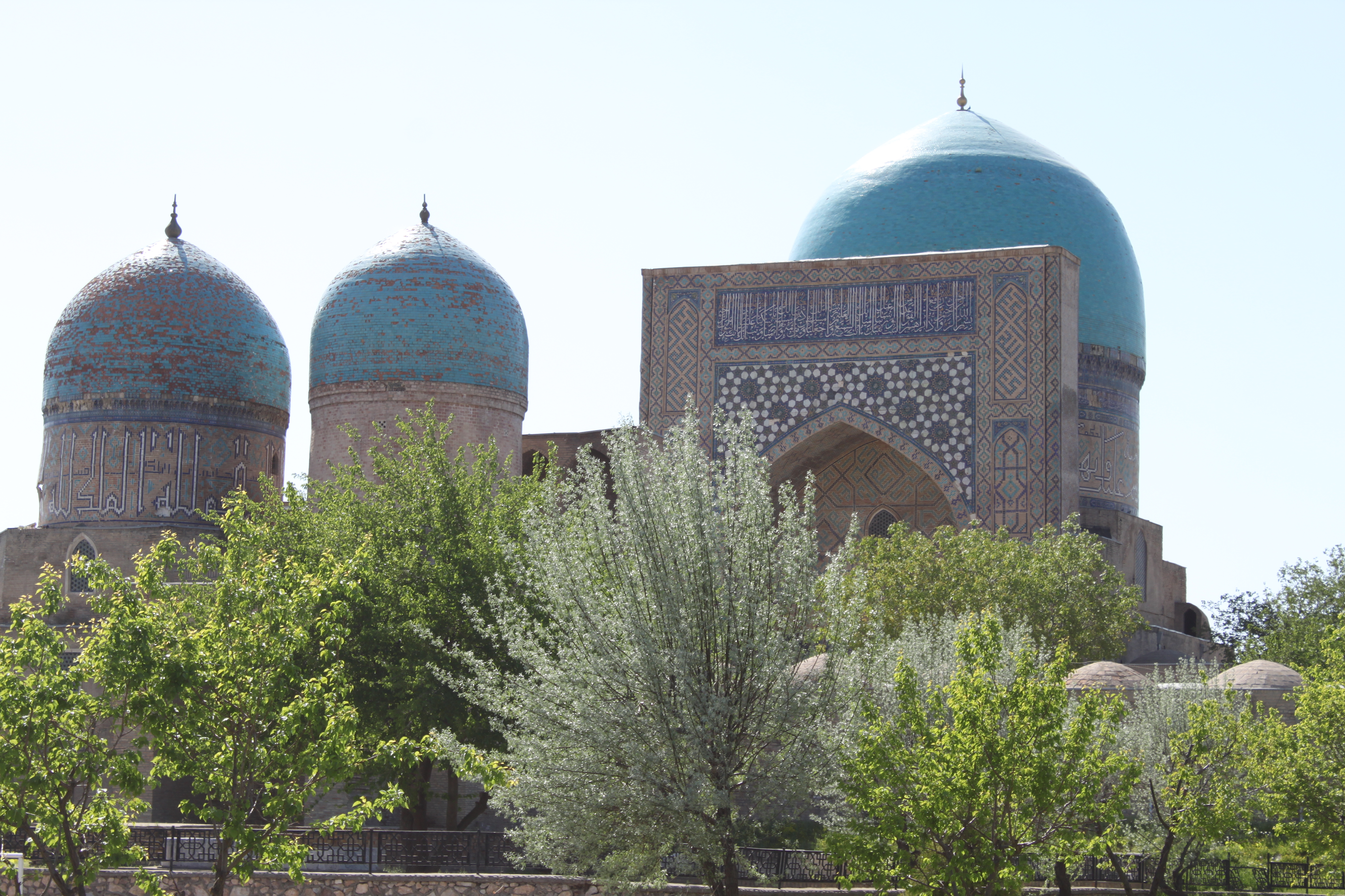 Vue générale du complexe Dorut Tilavat